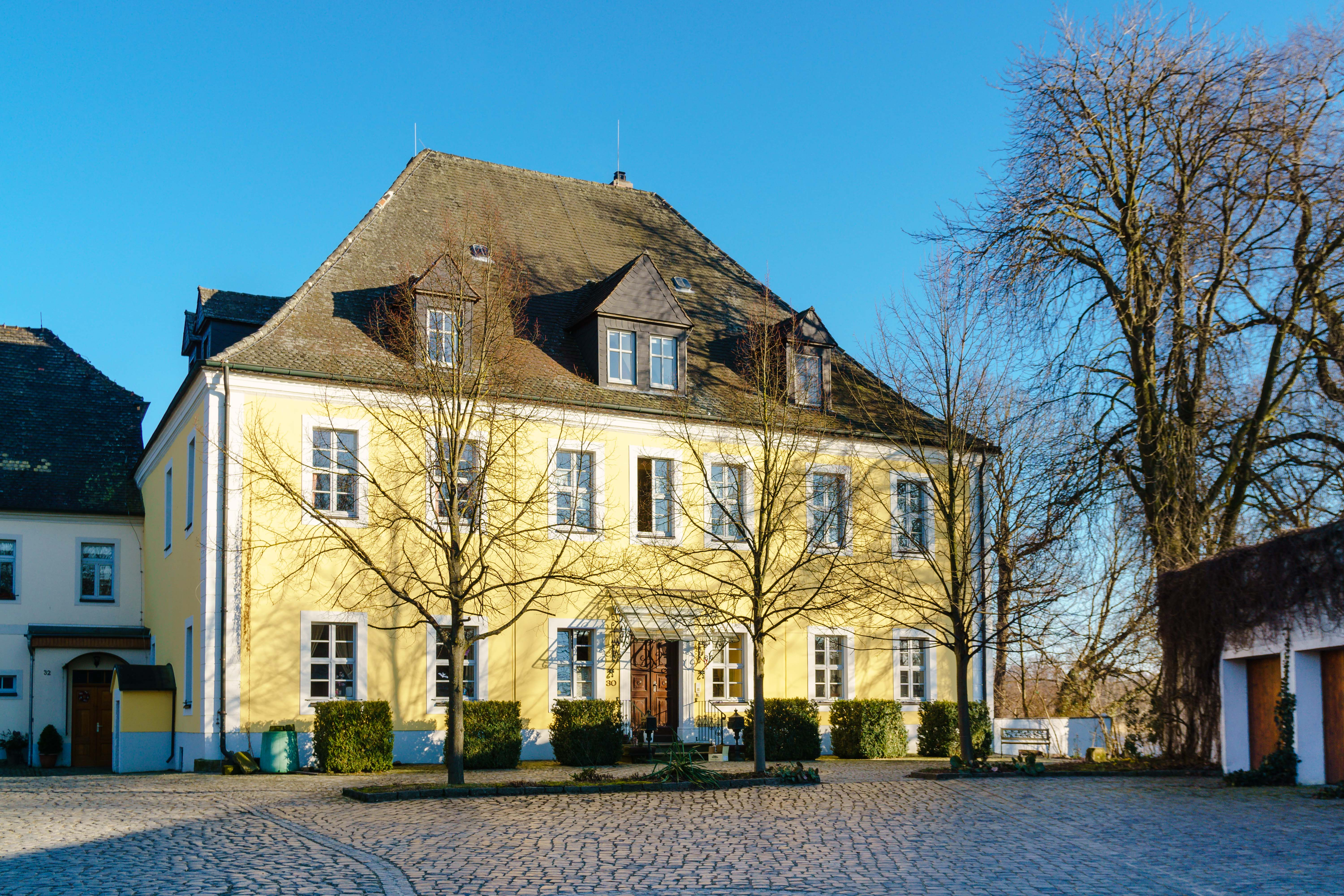 Herrenhaus, Am Mühlteich 28 ff. in Wurzen OT Mühlbach